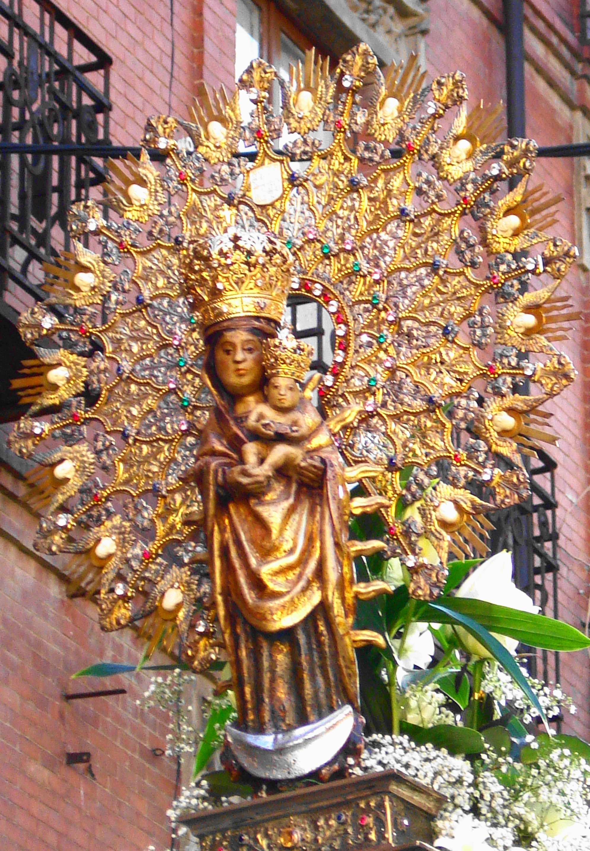 Virgen de la Calle, patrona de Palencia